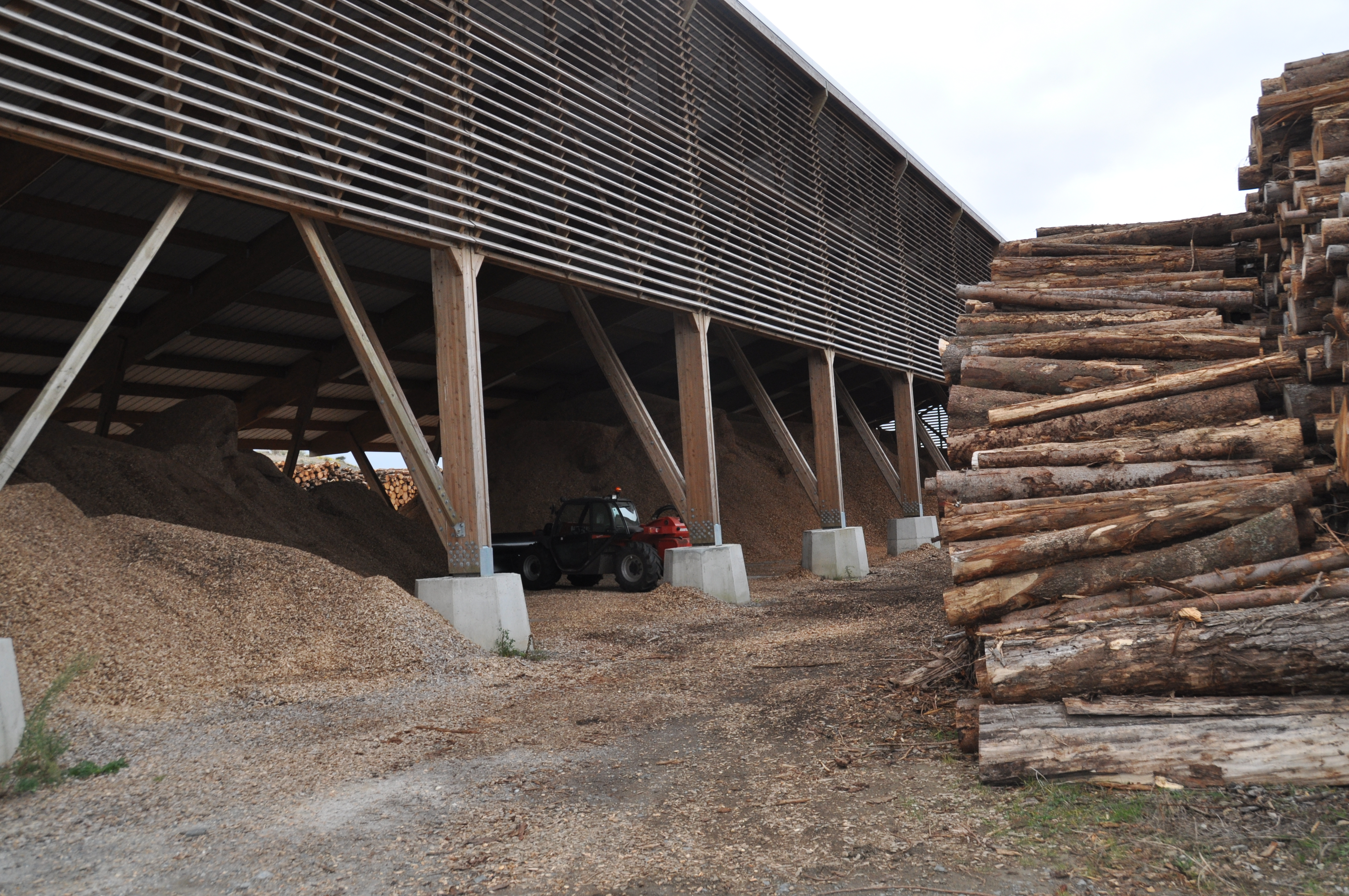 Fabrication de plaquettes de bois pour chaudières à bois